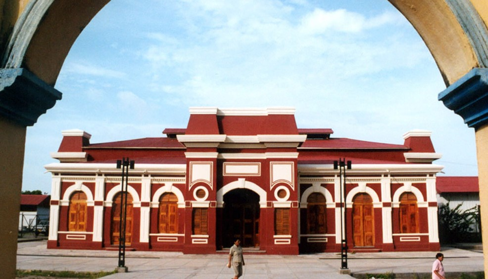 Granada Nicaragua, Granada station